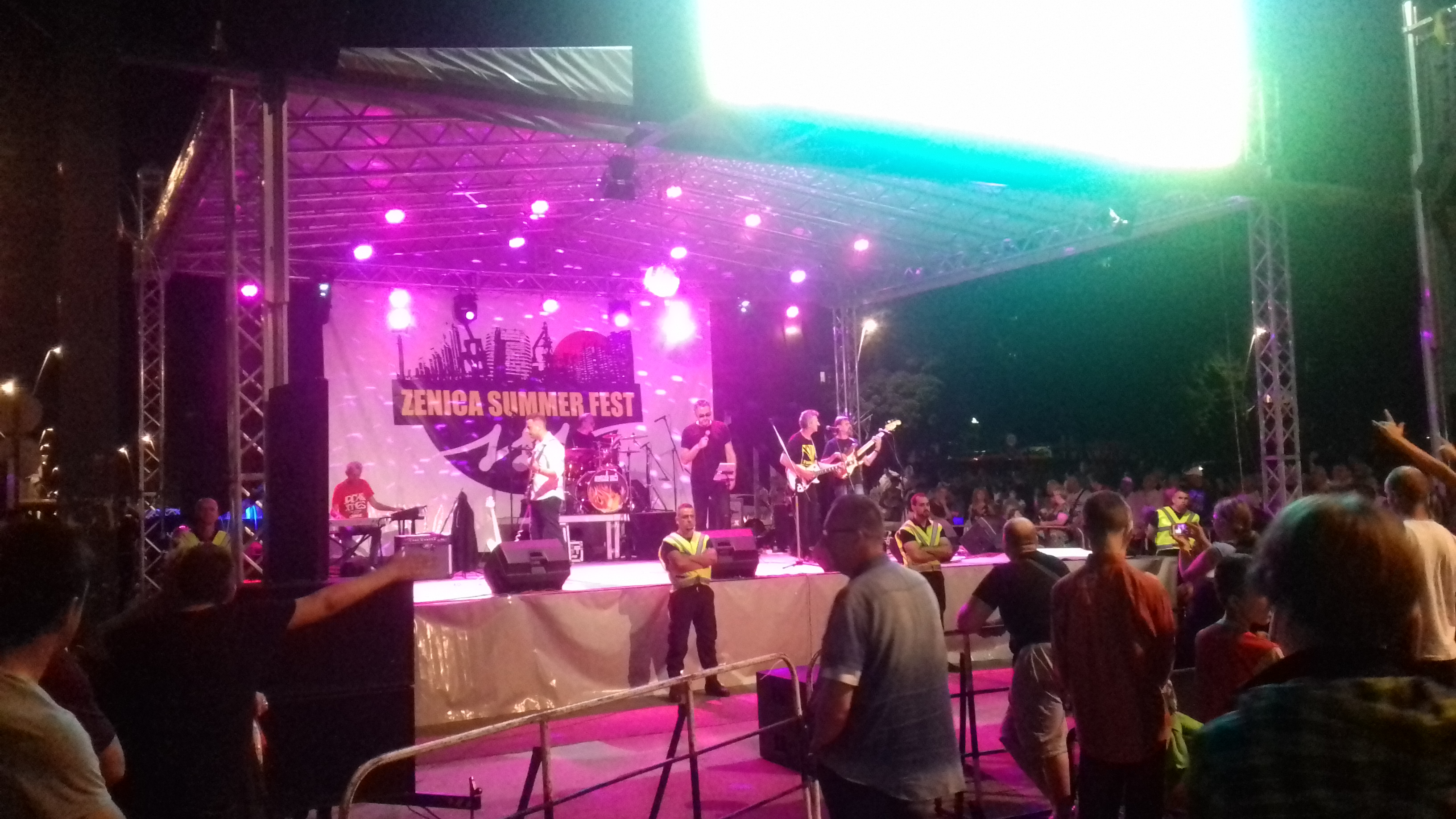 Наступ зеничке групе Немогуће вруће на Зеница самер фесту, трећи главни концерт фестивала